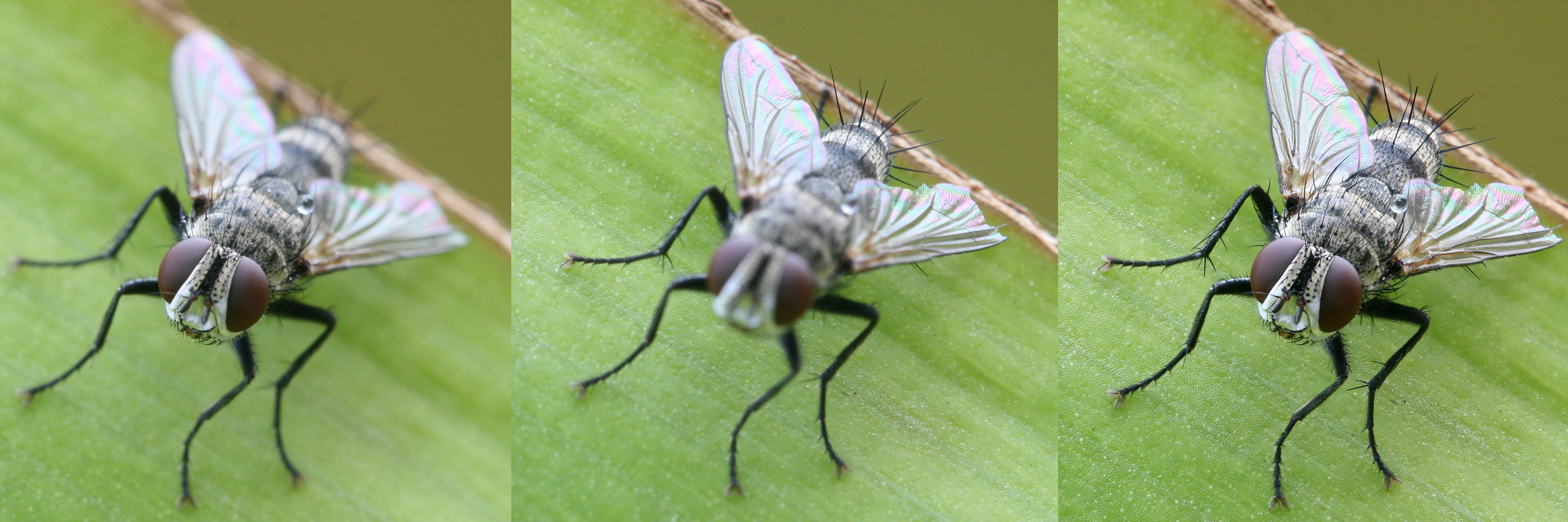 Bracketing exposició